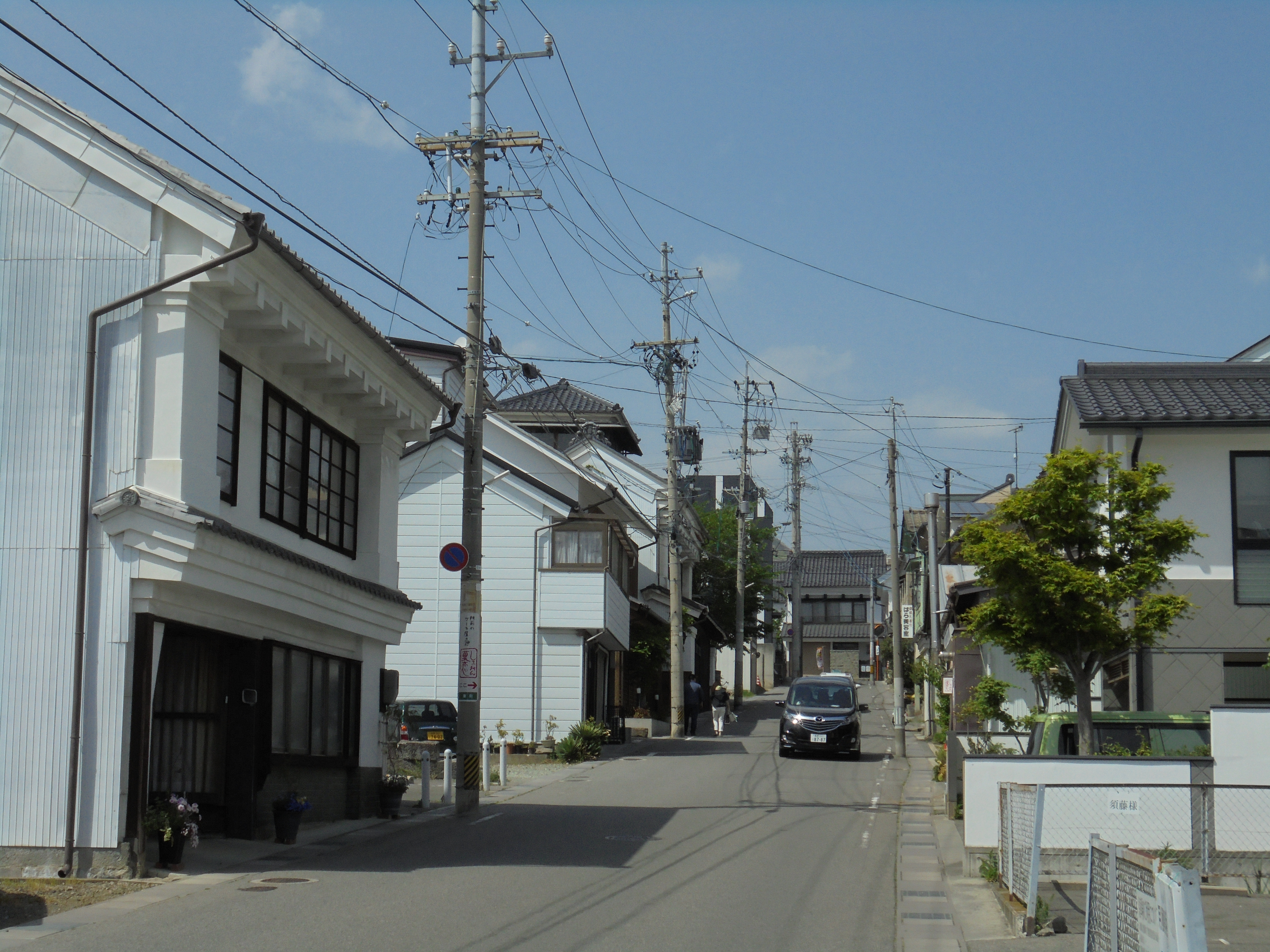 東町通り（長野県長野市東町）